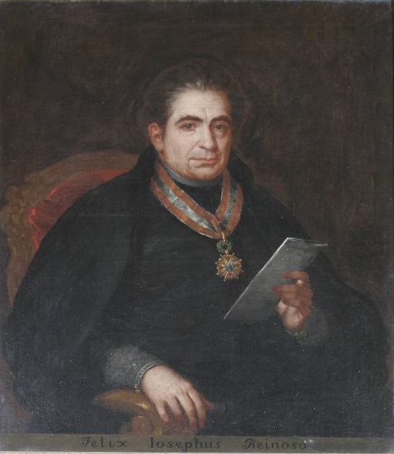 El retratado, Félix José Reinoso (1772-1841), aparece con traje eclesiástico negro, de su cuello cuelga una medulla, y con su mano izquierda sostiene un papel.